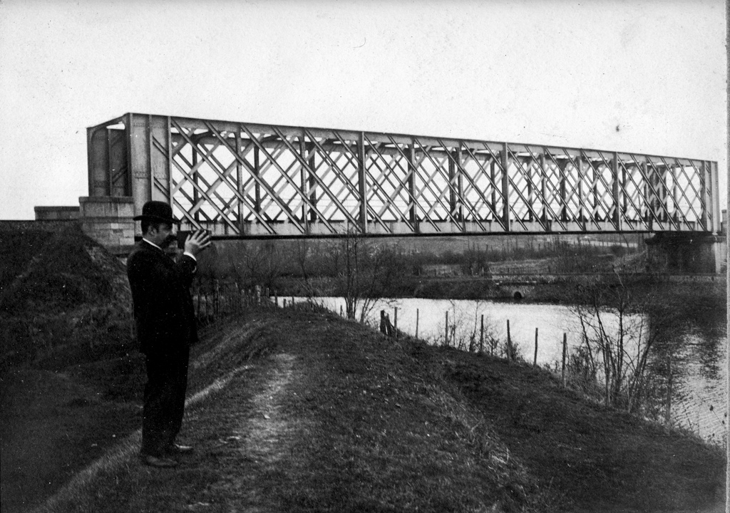 Pont ferroviaire sur la ligne de Caen à Cerisy-Belle-Étoile à la limite entre Allemagne (actuellement Fleury-sur-Orne) et Louvigny.